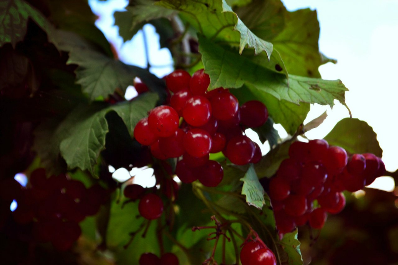 Червона калина. Городня. 18 вересня 2015.